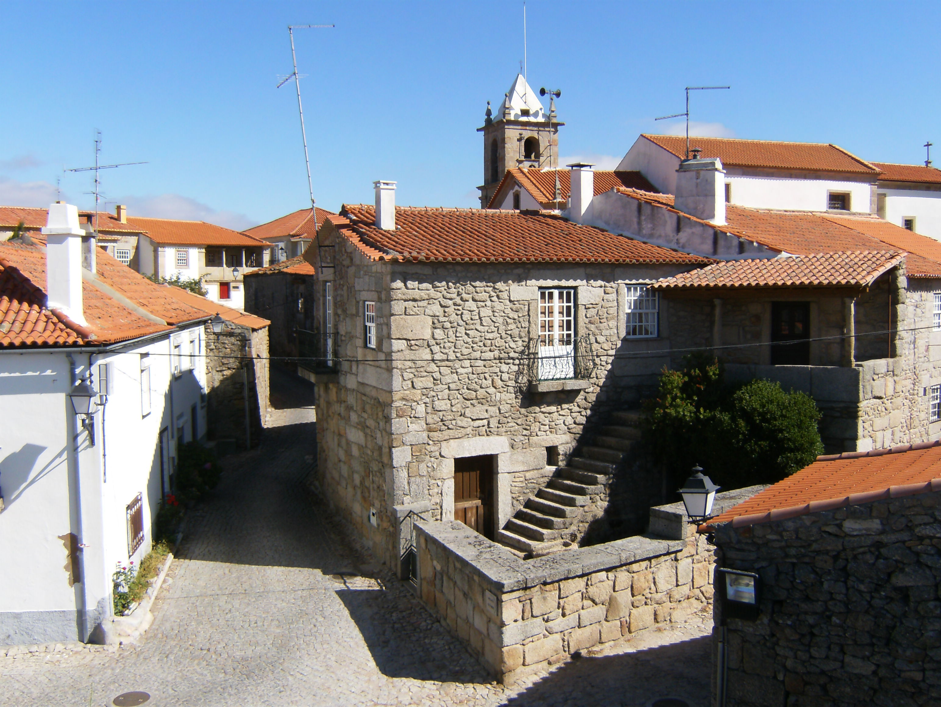 Castelo Bom: vista da parte central da vila medieval, a partir do adarve (parte superior das muralhas)